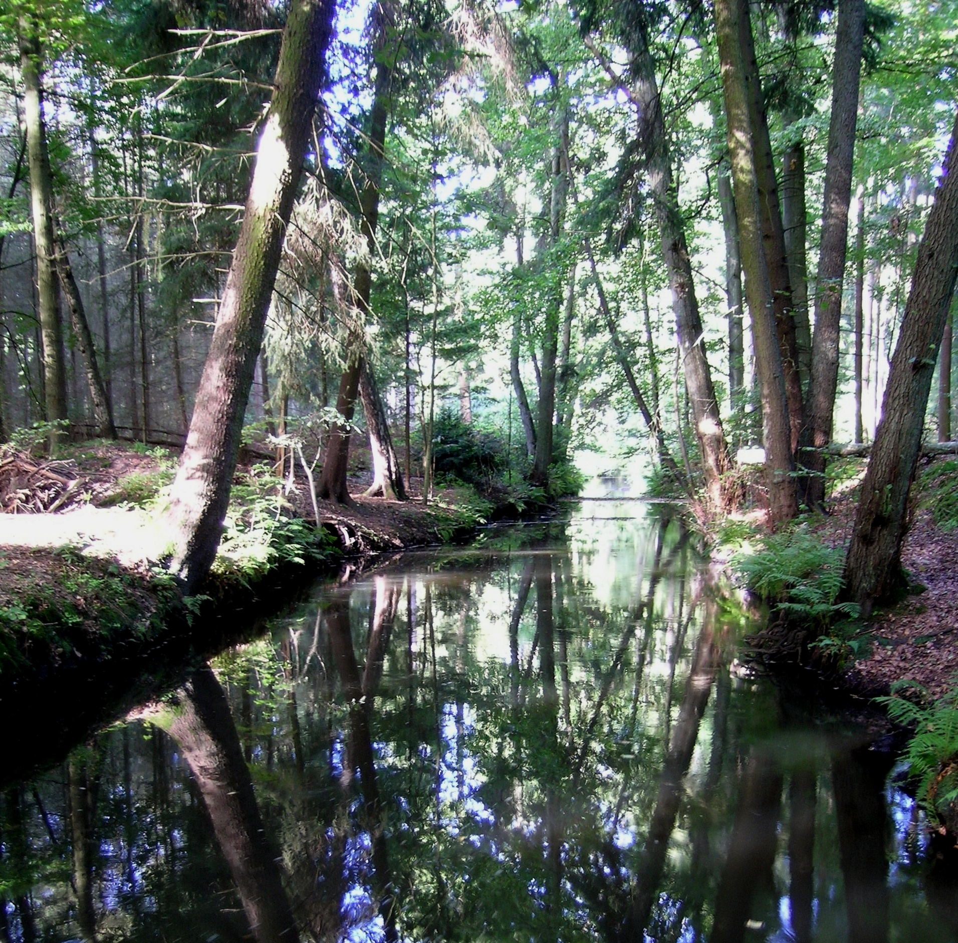 Meiße beim Gut Sunder, begradigt und vertieft The River Meiße near Sunder Estate, straightened and deepened. Lower Saxony, Germany.